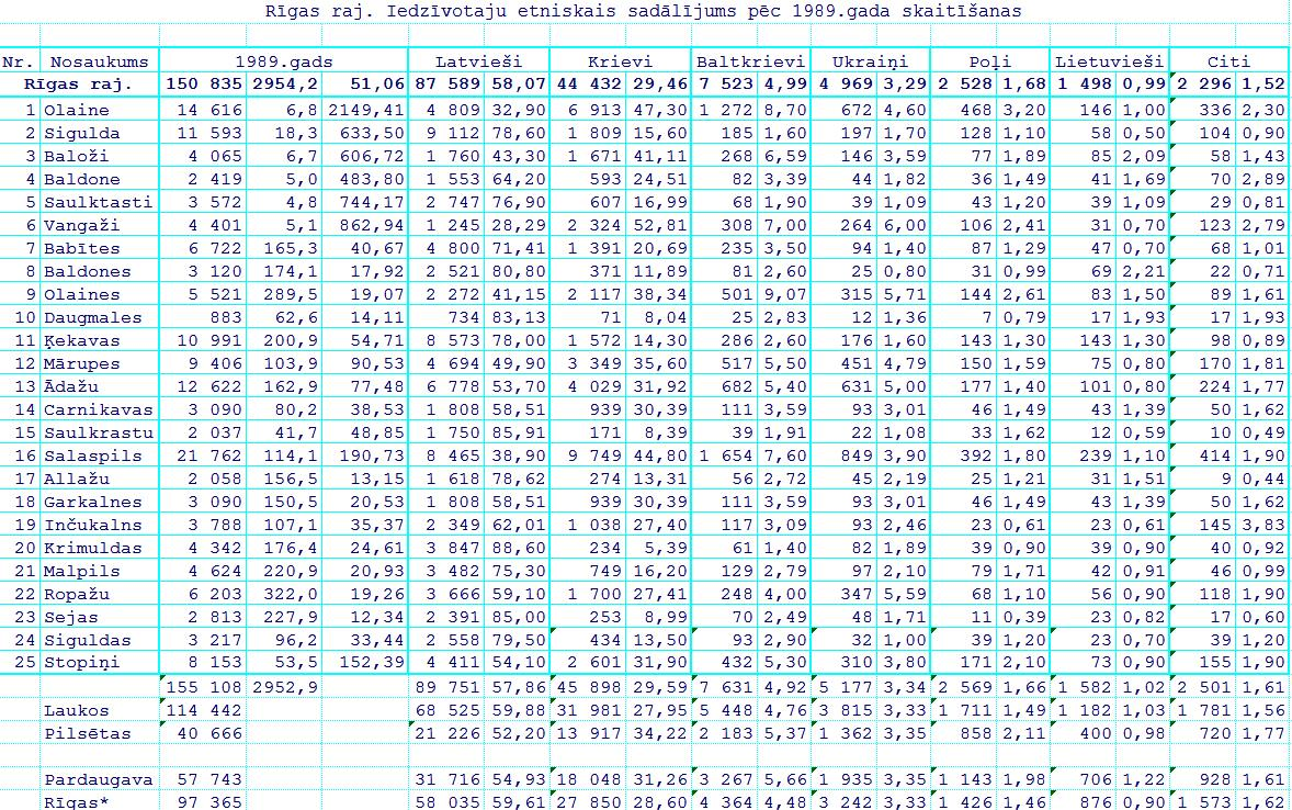 Этнический состав населения Латвии по переписи 1989 года